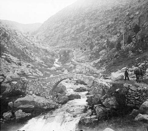 Imatge